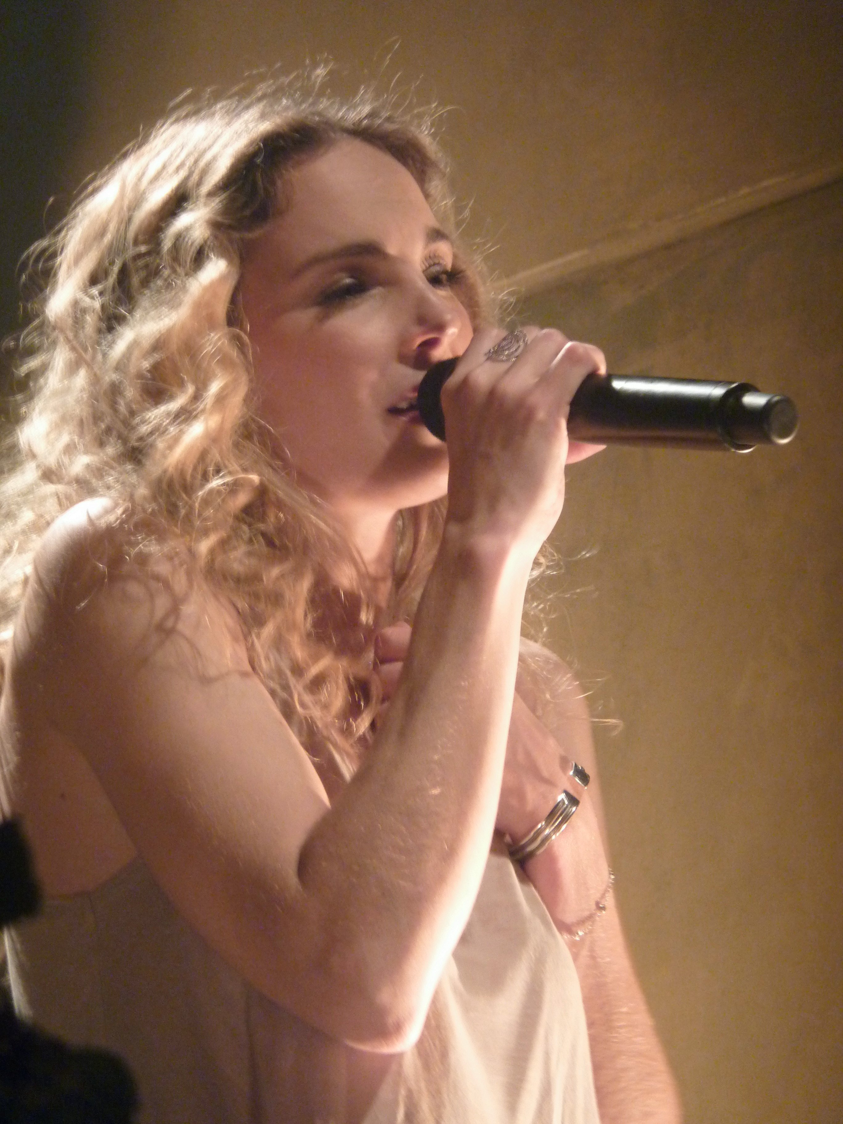 Claire Keim en concert en Mai 2011 au Studio des Champs Elysées dans le cadre de sa tournée piur la promo de son album "où il pleuvra "